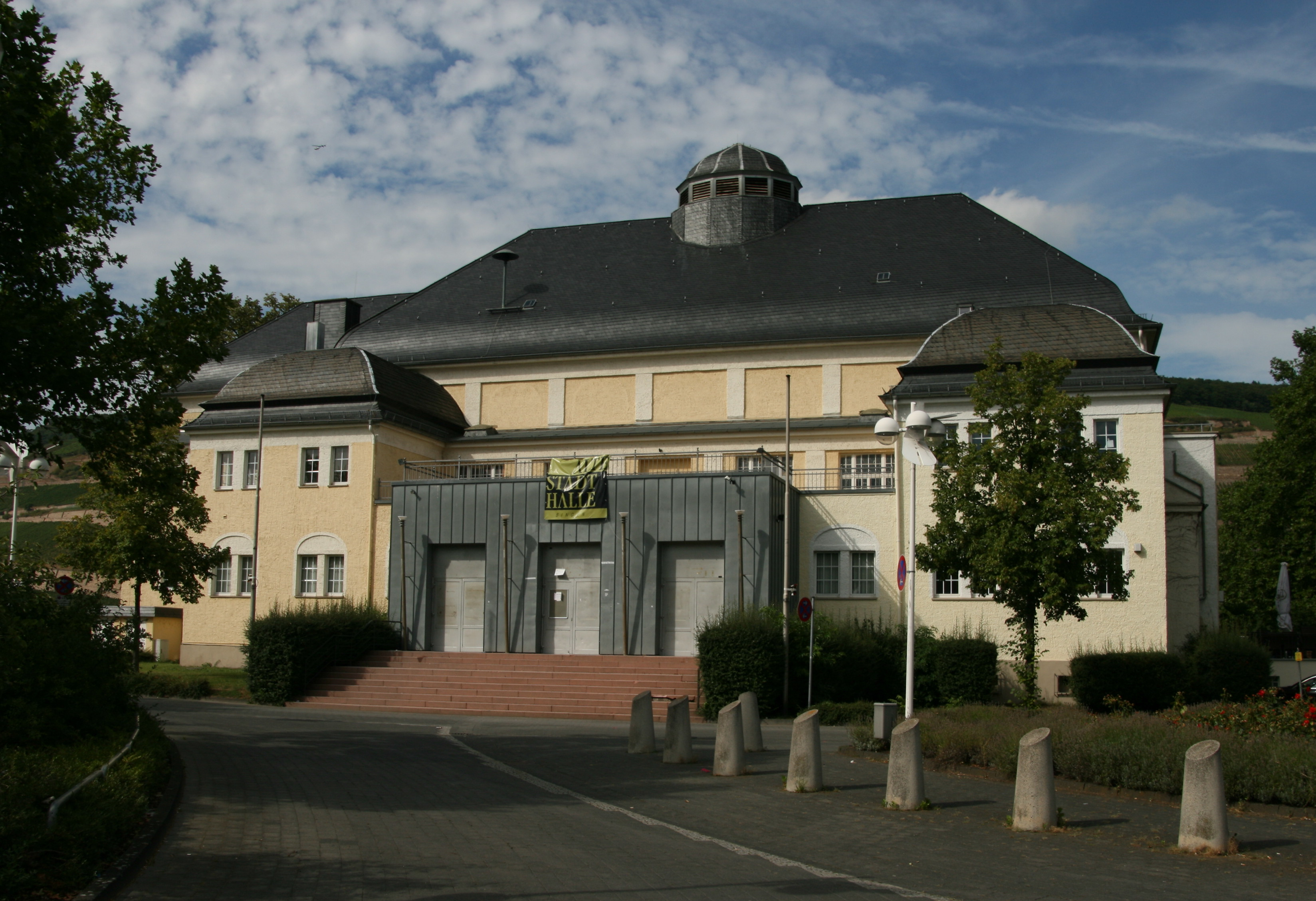 Alte Stadthalle (Festhalle), Bingen am Rhein. 1911–13, Architekt Robert Leibnitz (Berlin)